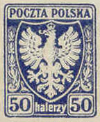 Польша. Марка первого стандартного выпуска номиналом в 50 геллеров. 1919 г.